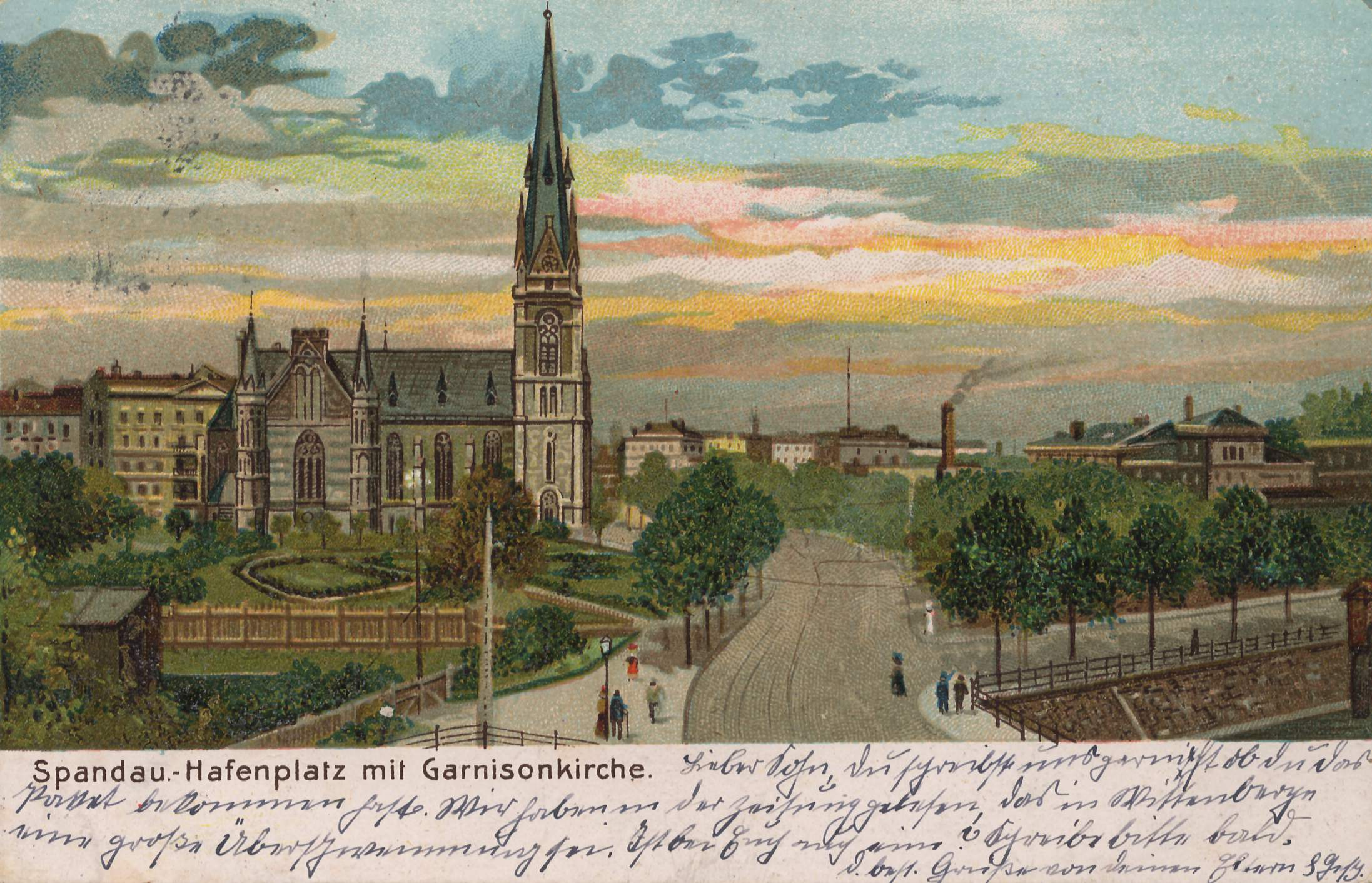 Hafenplatz mit Garnisonkirche